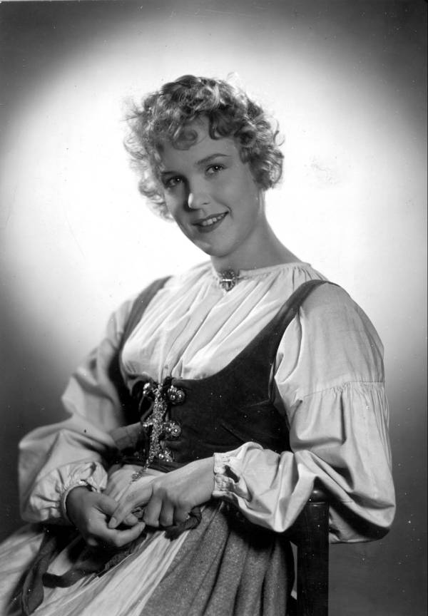 Eva Dalhbeck i debutfilmen Rid i natt, 1942, efter Vilhelm Mobergs roman, regi Guistaf Molander